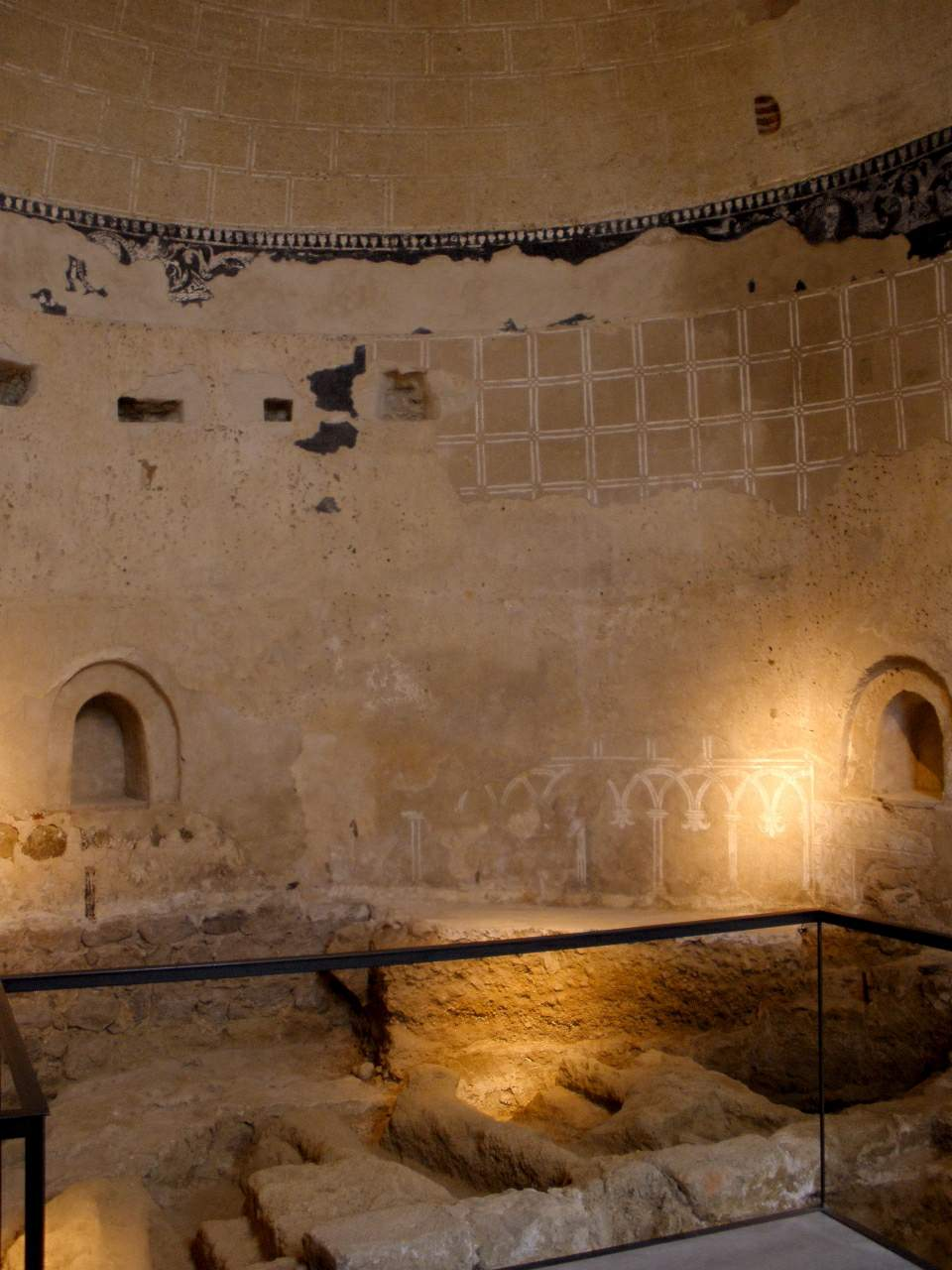 Iglesia de la Magdalena (Plasencia)